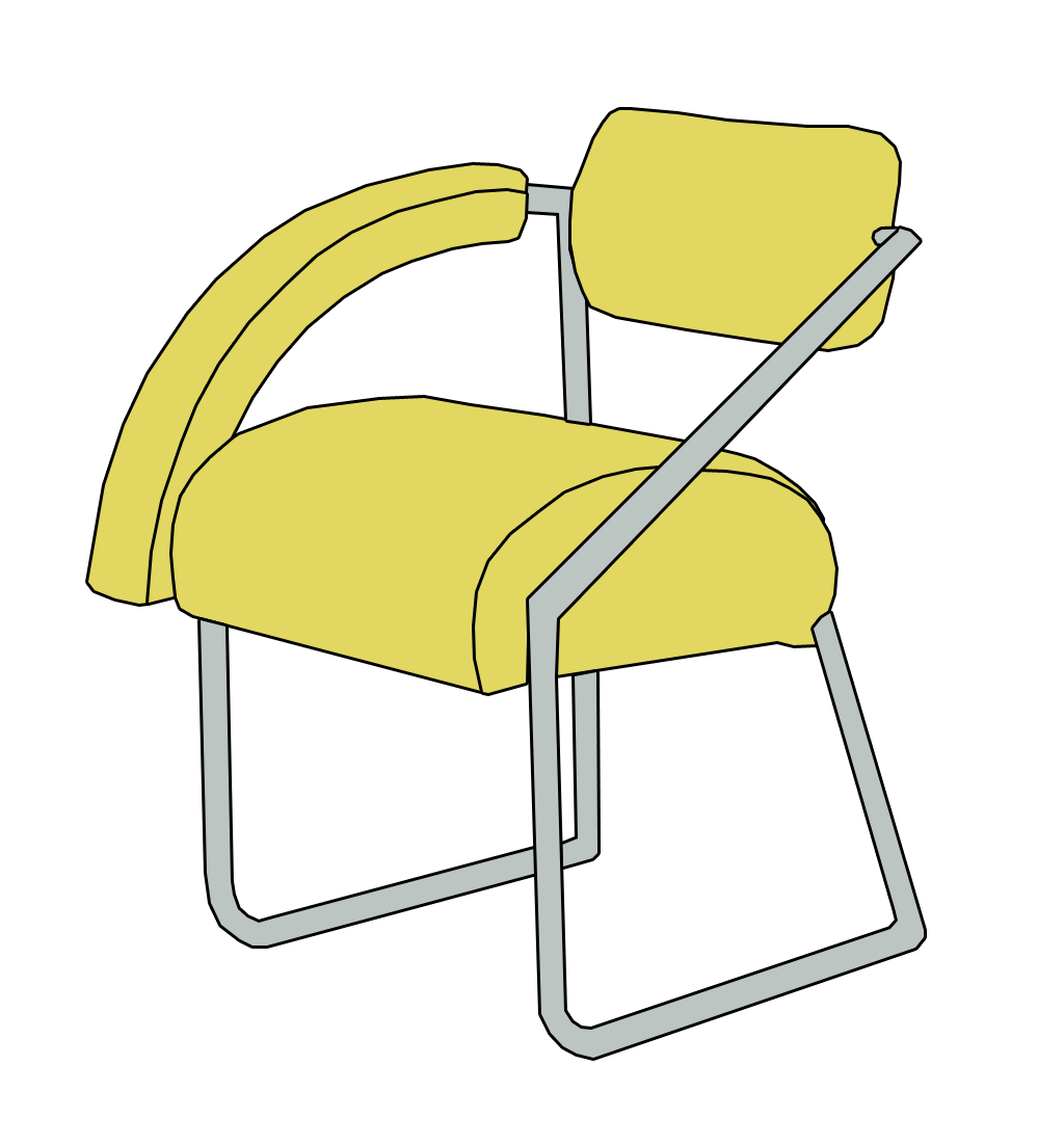 Chaise « Non-Conformiste » conçue par Eileen Gray (1878-1976)